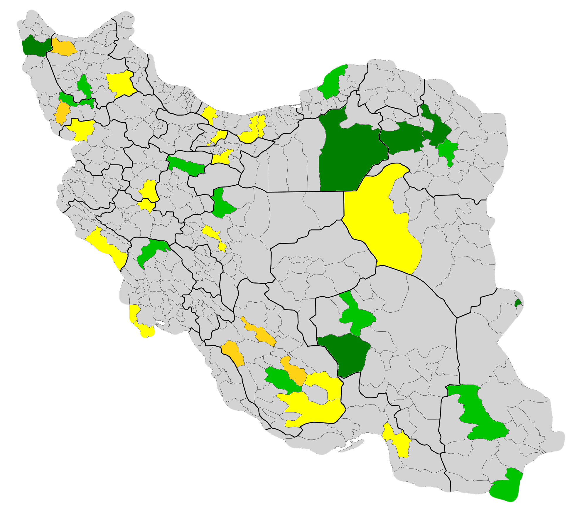 نقشه فرمانداری‌های ویژه در ایران به تفکیک برخورداری از شاخص‌های پنجگانه فرمانداری ویژه راهنما: پنج شاخص چهار شاخص سه شاخص دو شاخص پرونده اصلی:File:Iran_Counties.svg